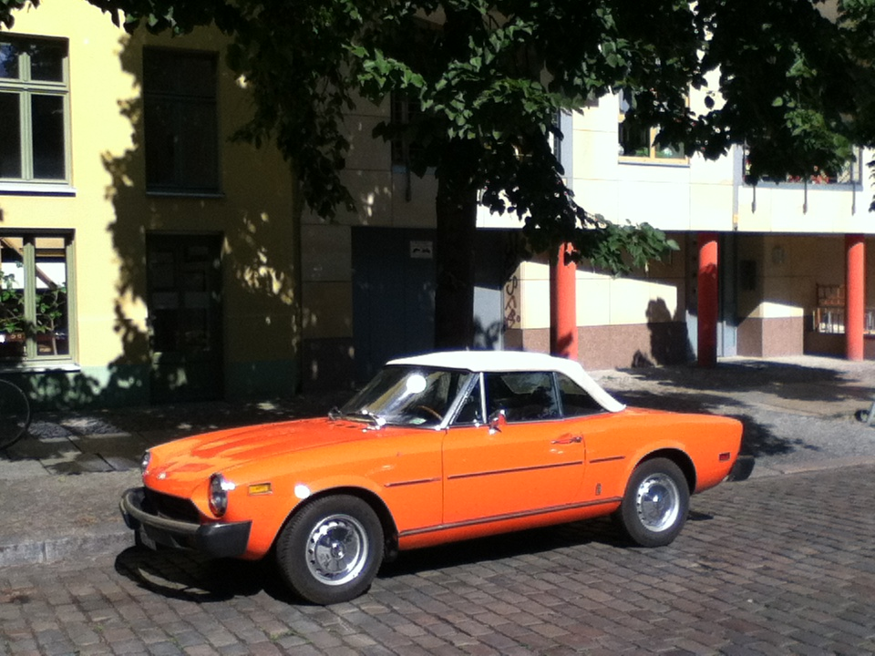 cabriolet orange Fiat